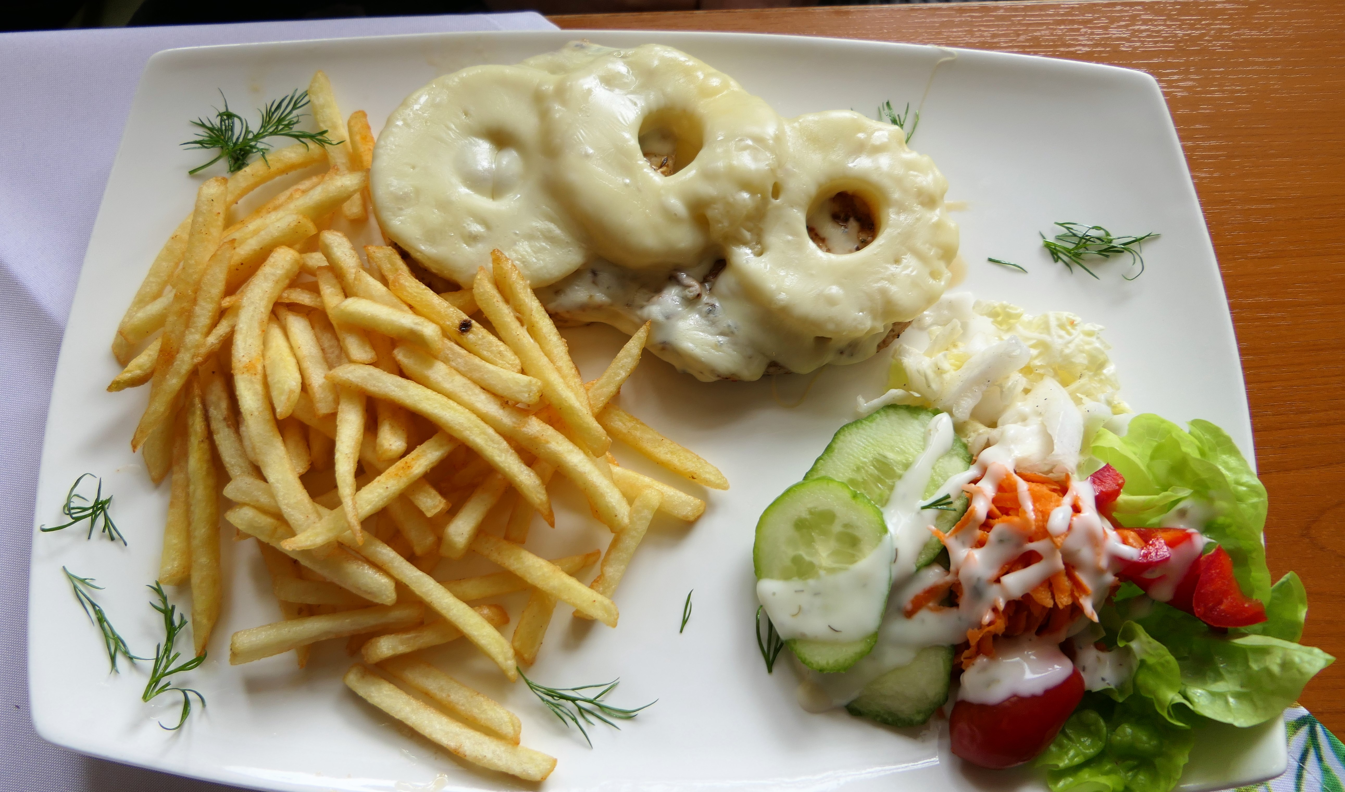 Steak Hawaii